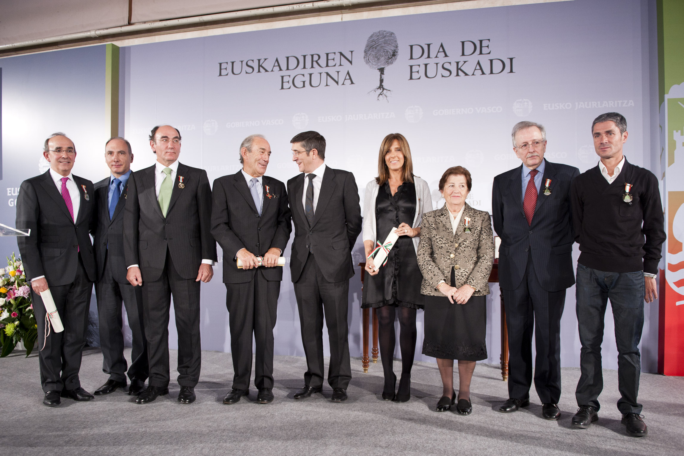 Día de Euskadi.jpg